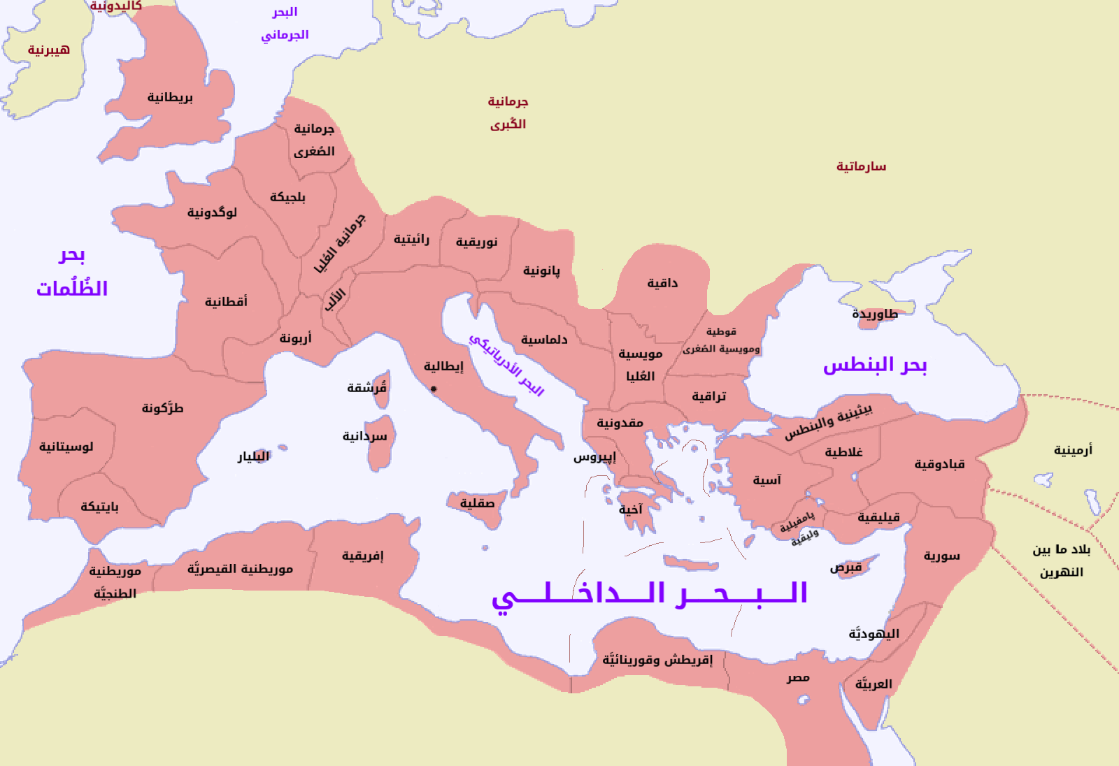 خارطة تُبيِّنُ حُدود الإمبراطوريَّة الرومانيَّة بِجميع ولاياتها حوالي سنة 117م.